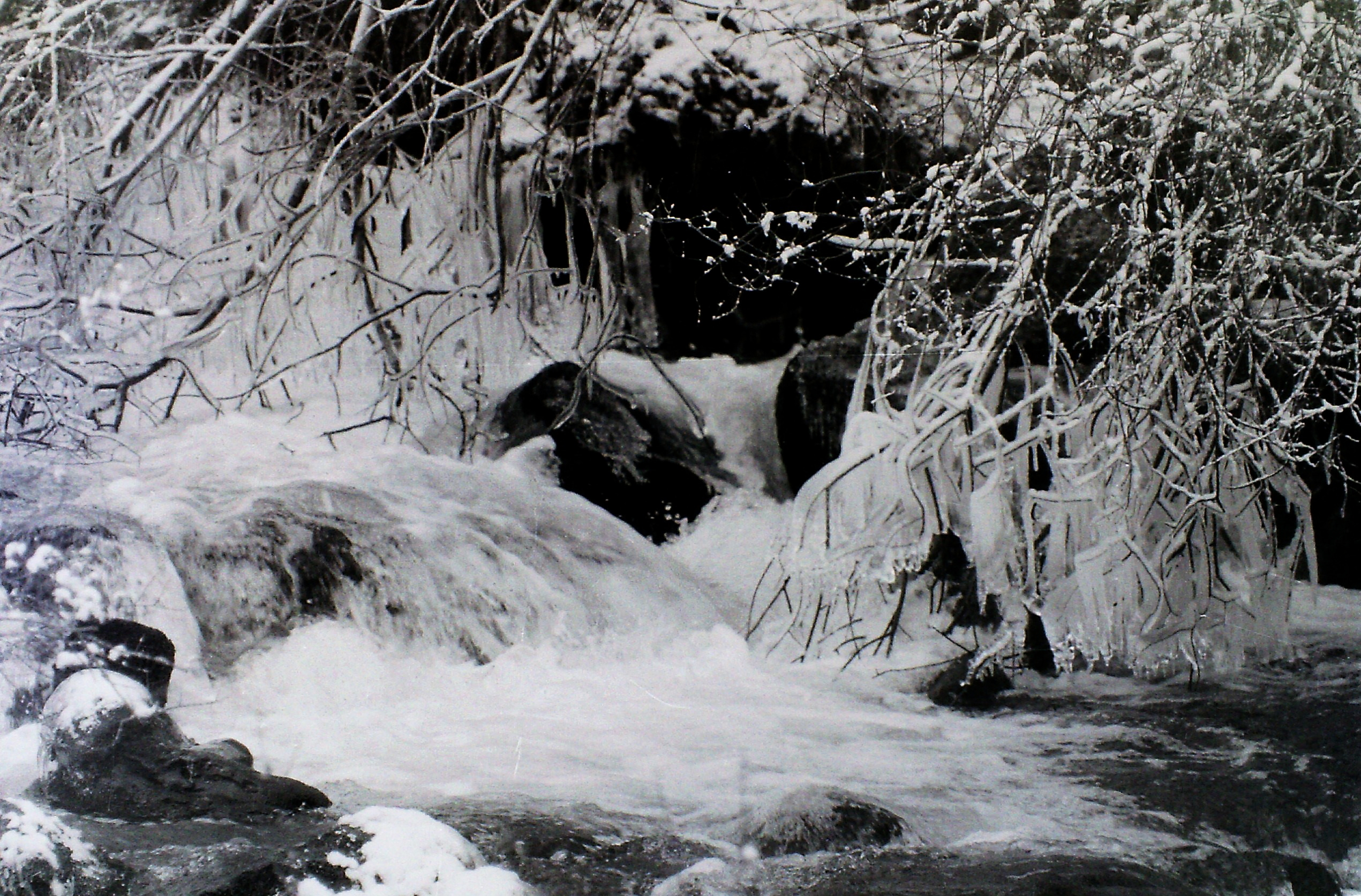 La jonction du Lavedan et du Couradet en Hiver. Aulon, Réserve naturelle régionale d'Aulon en Hiver.- Hautes-Pyrénées.- France.